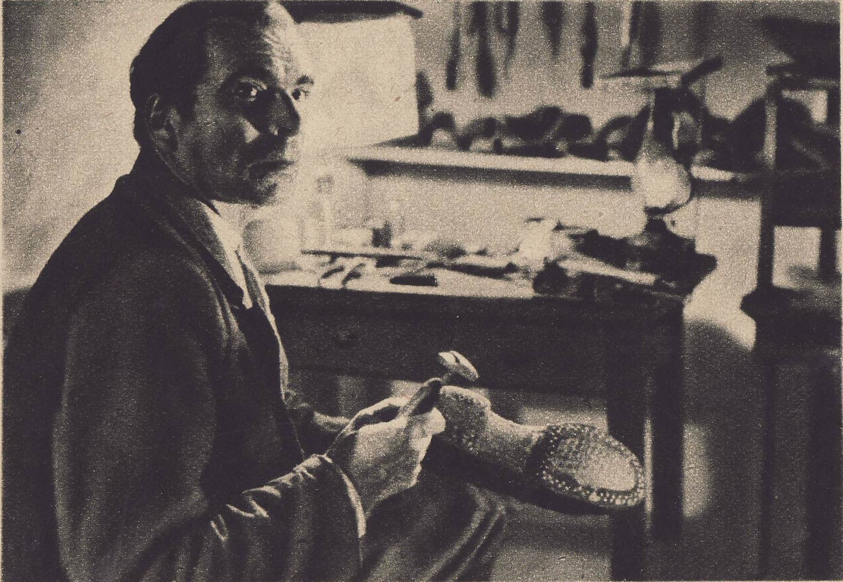 Jacek Woszczerowicz jako szewc Leon w filmie "Dwie godziny"